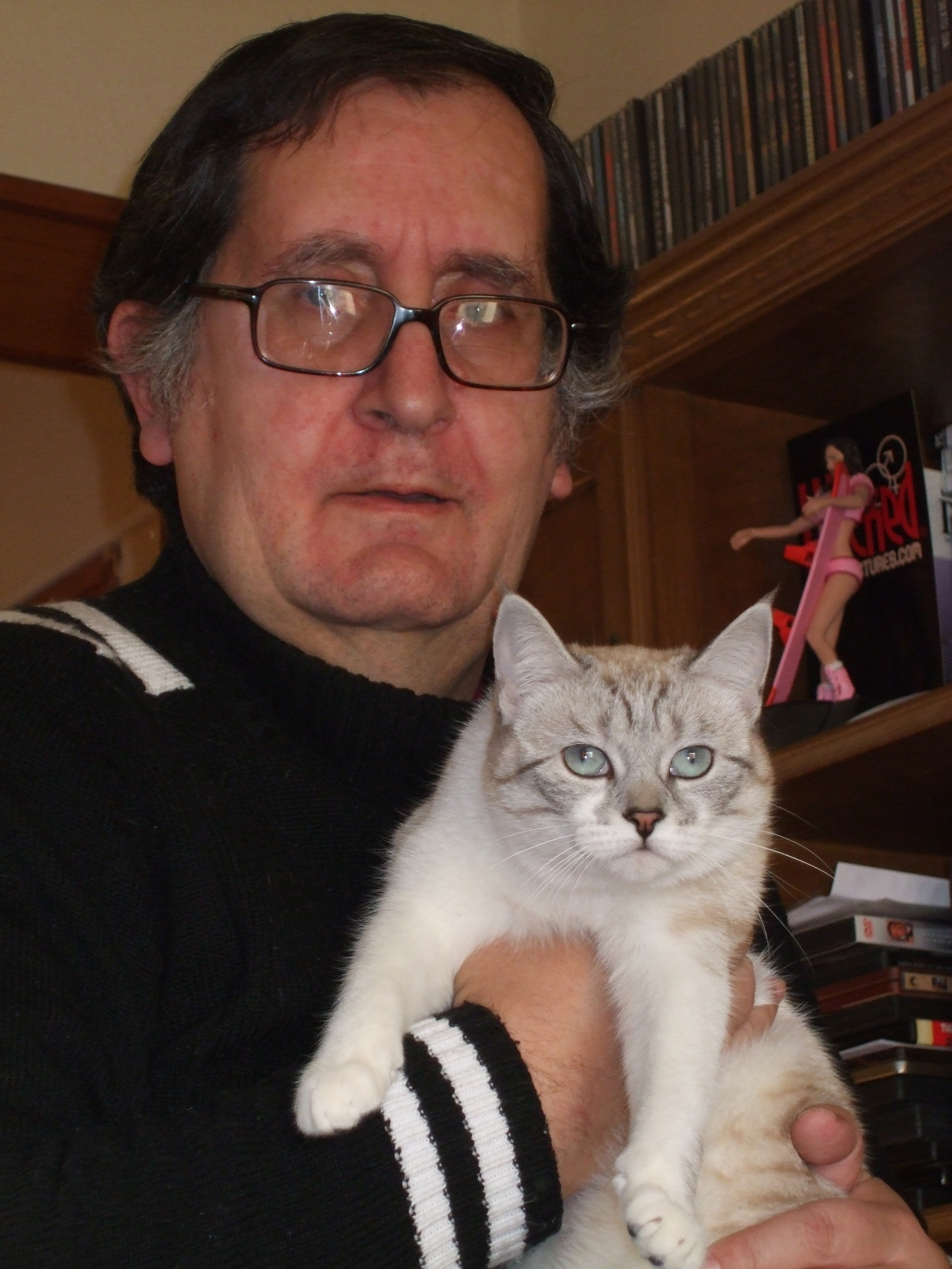 Salvador Sáinz, escritor y actor de cine, que publicó la novela "Estruch" entre otras